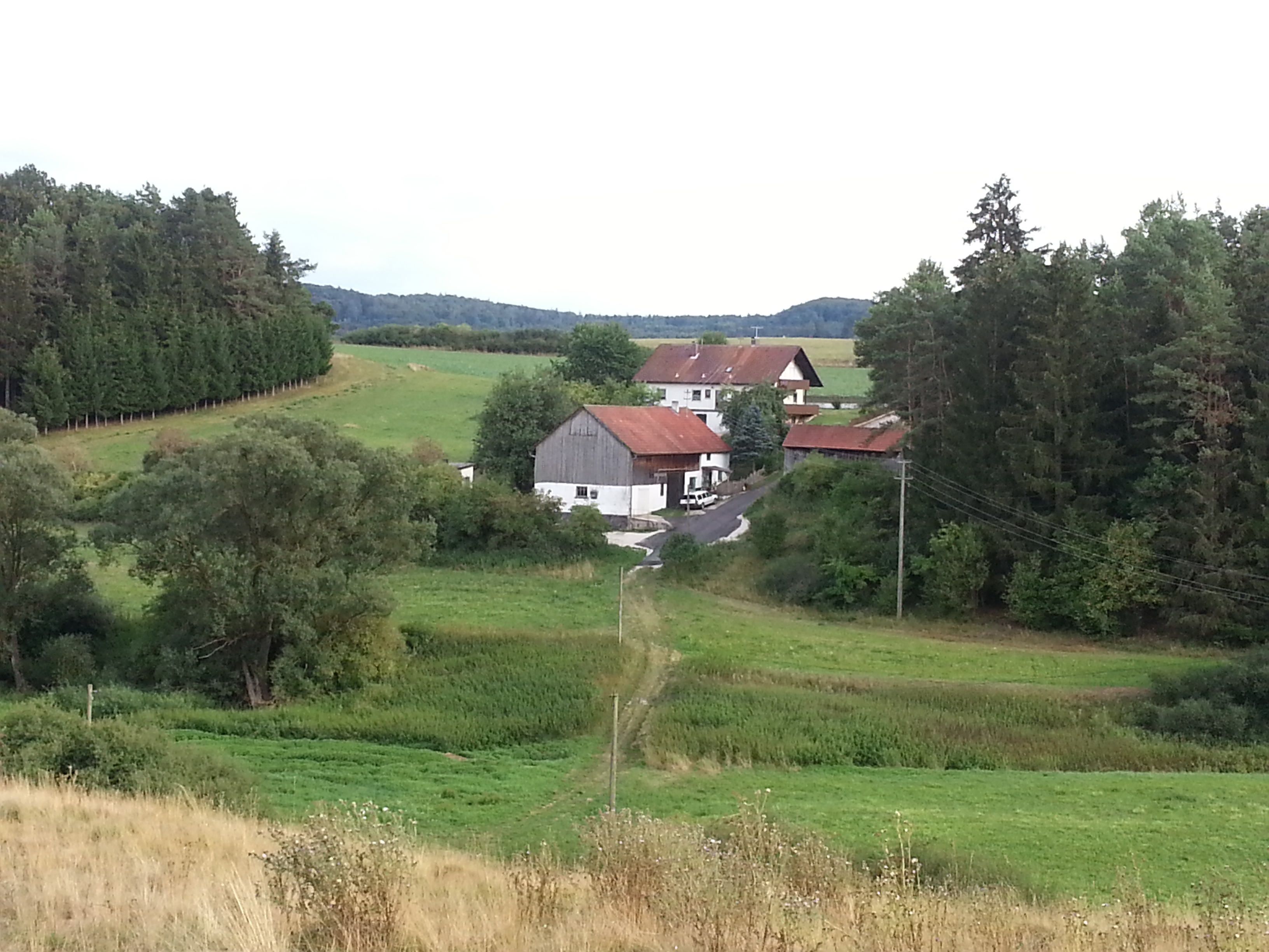 Katzenfels, Gemeinde Parsberg